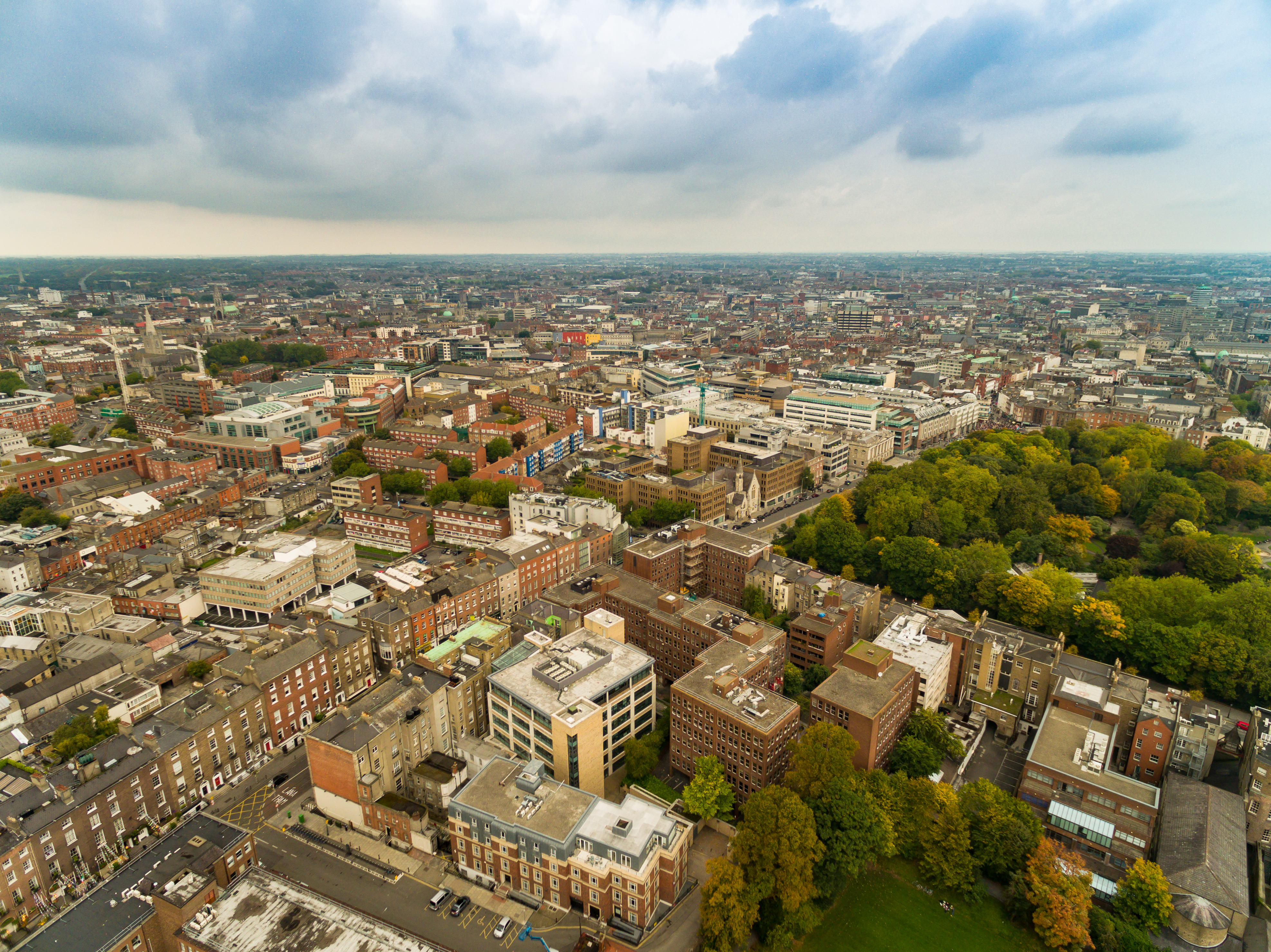 dublin